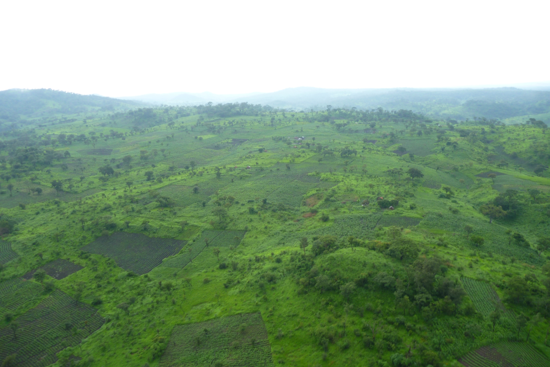 Les collines verdoyantes du Katanga durant la saison des pluies.